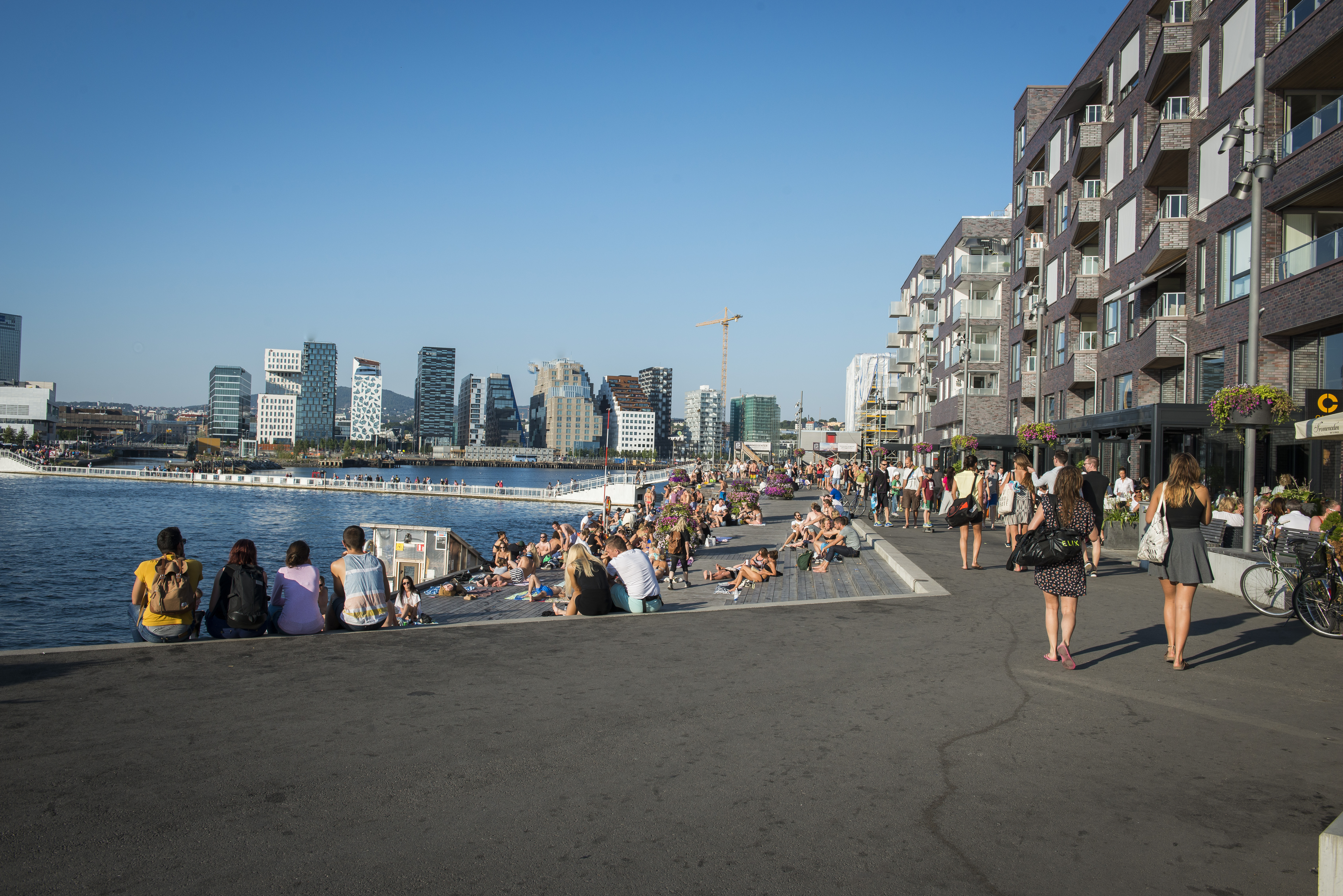 Havnepromenaden på Sørenga, sett mot Barcode.